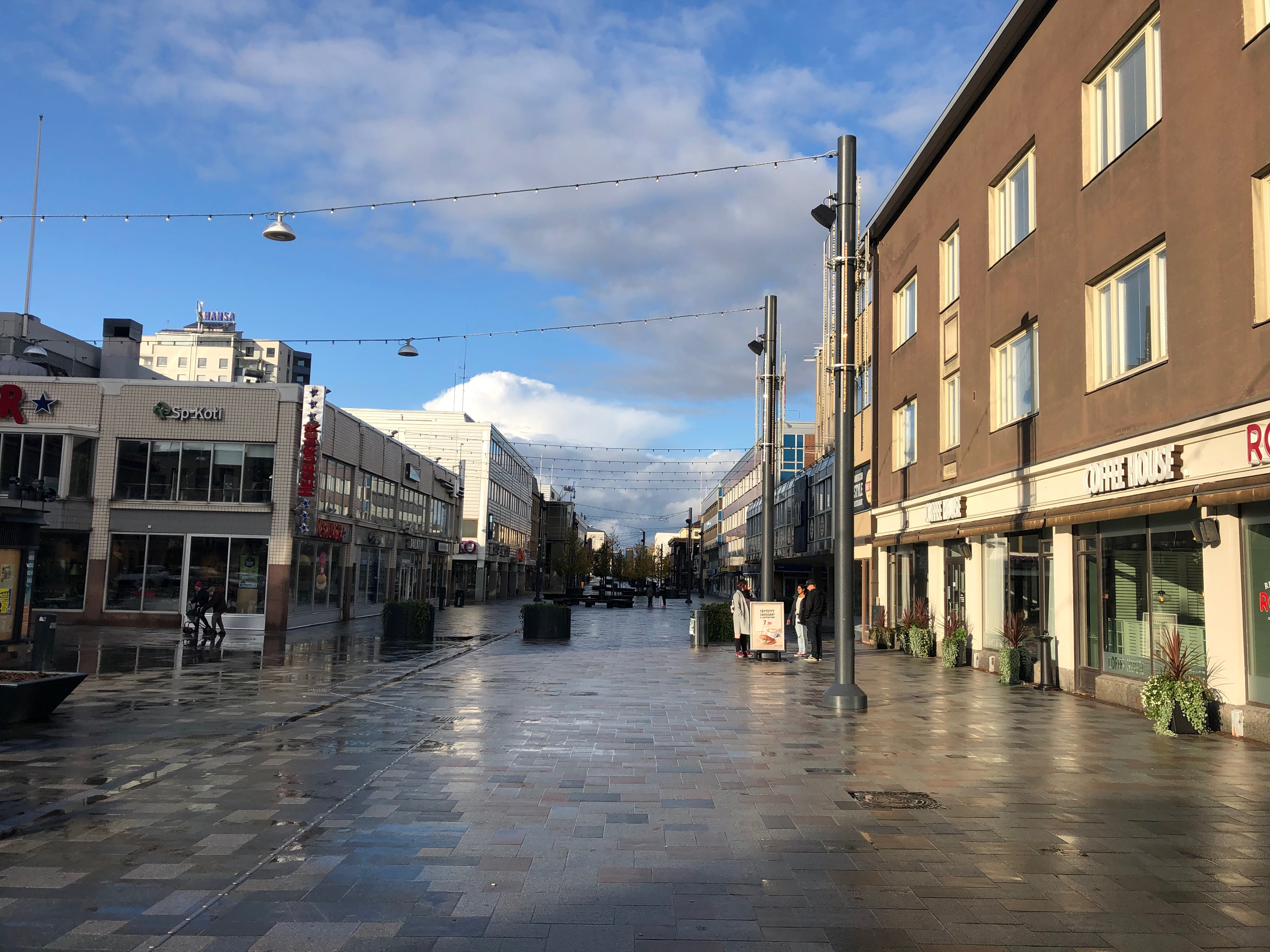 Коувола